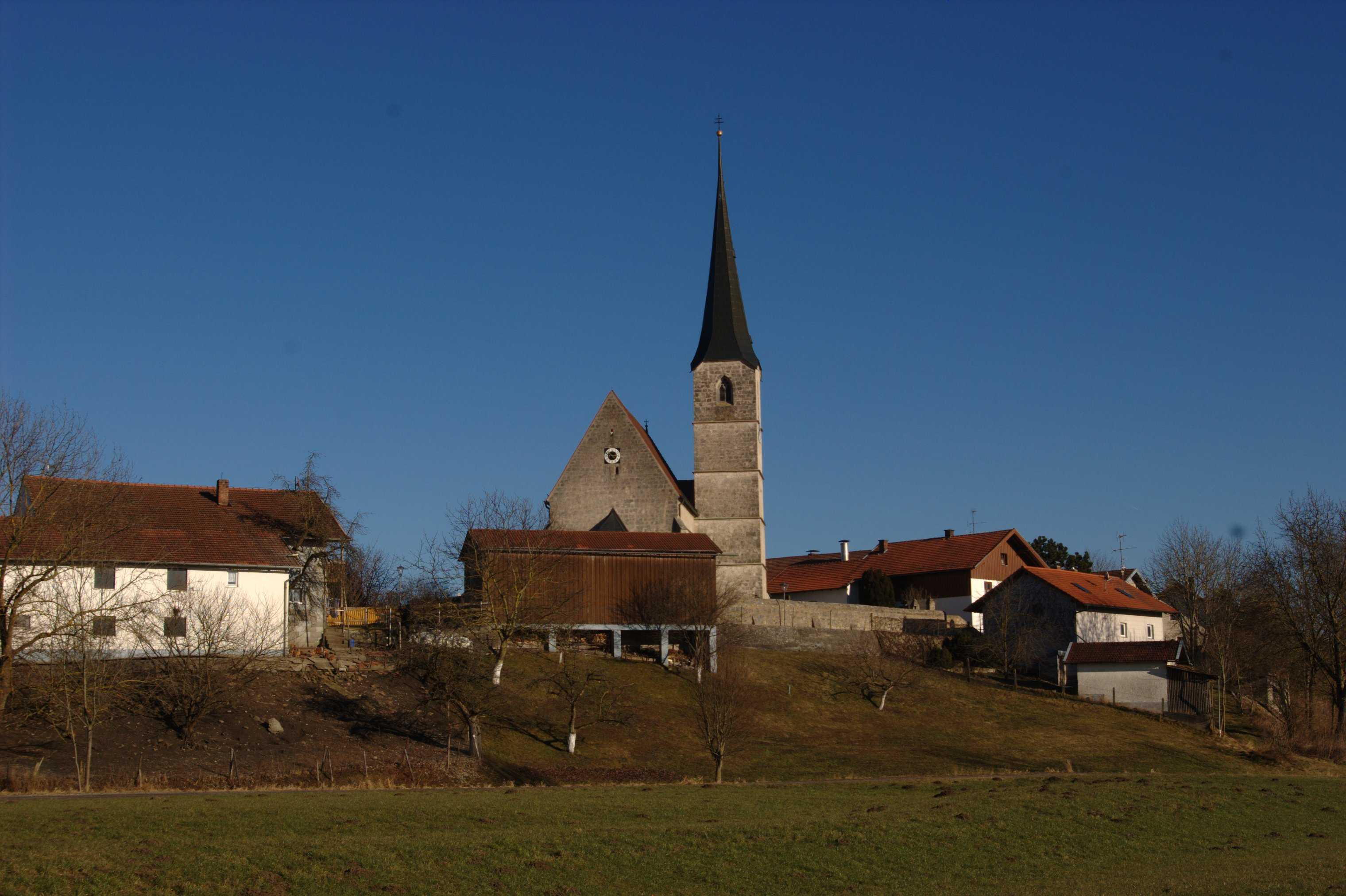 Kirche St. Jakobus der Ältere im Ortsteil Seibersdorf, Kirchdorf a. Inn